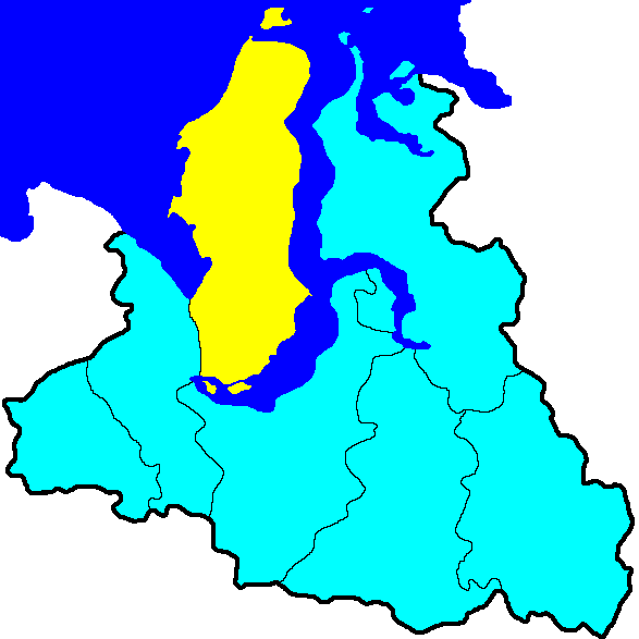 Ямальский район на карте Ямало-Ненецкого АО